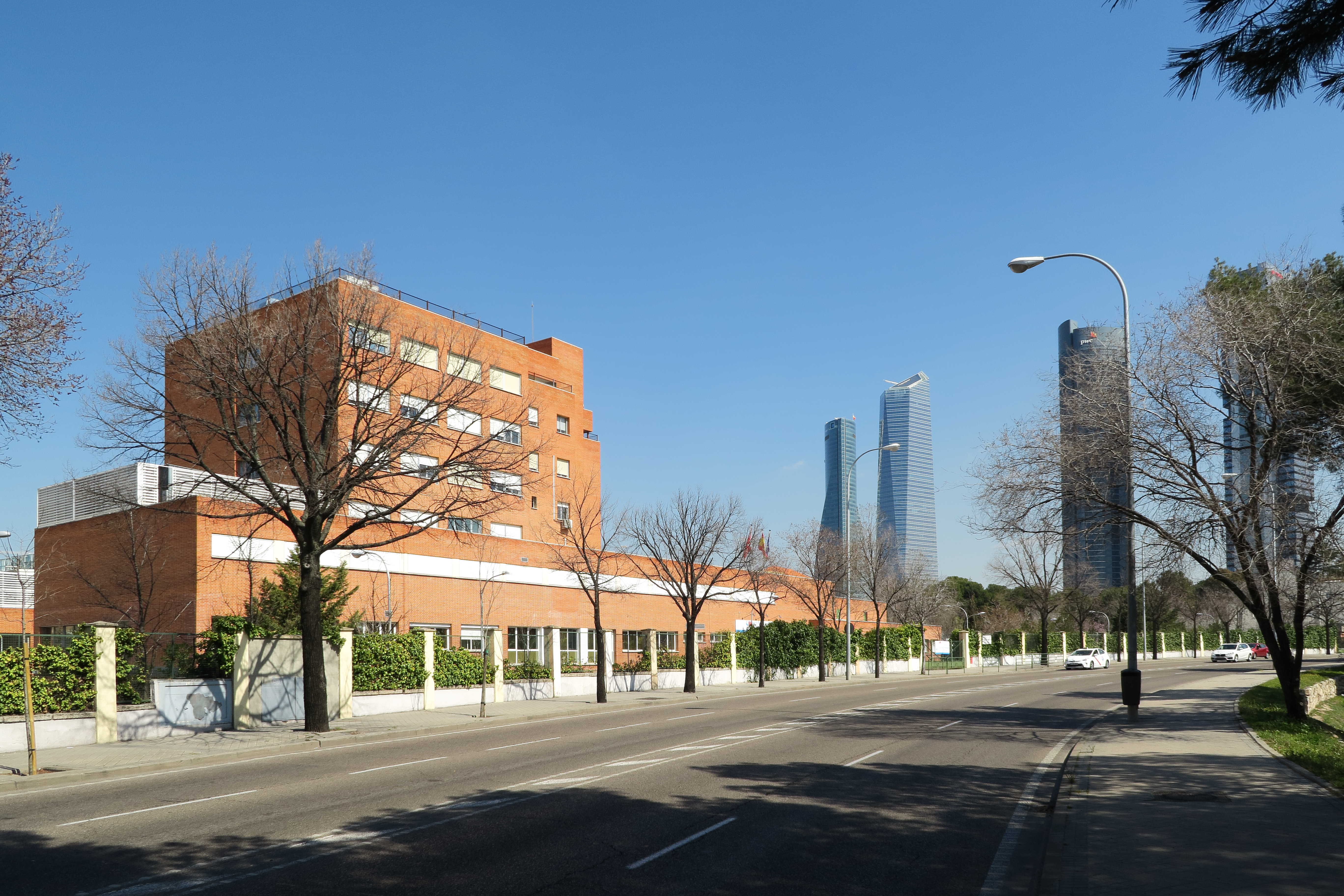 Hospital Carlos III